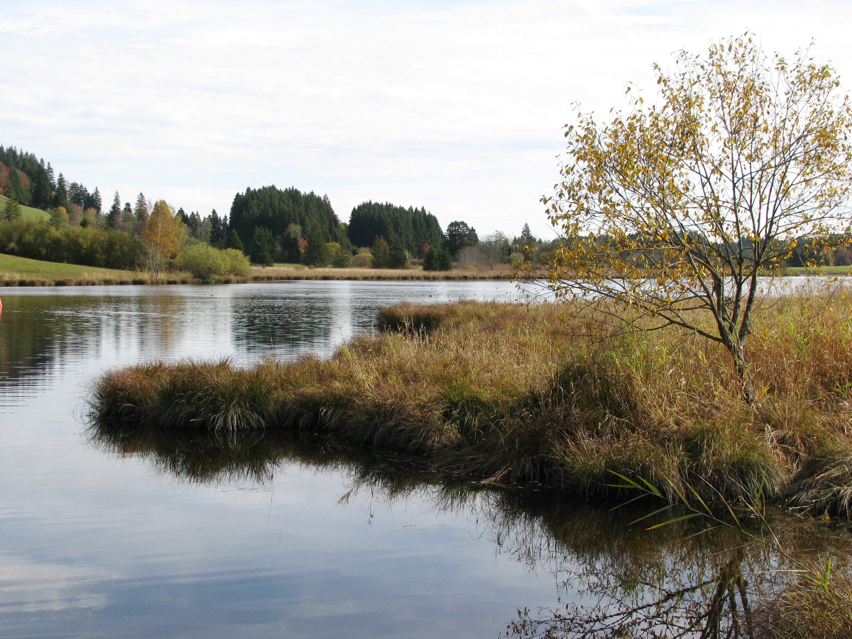 Schwarzenberger Weiher nach Osten